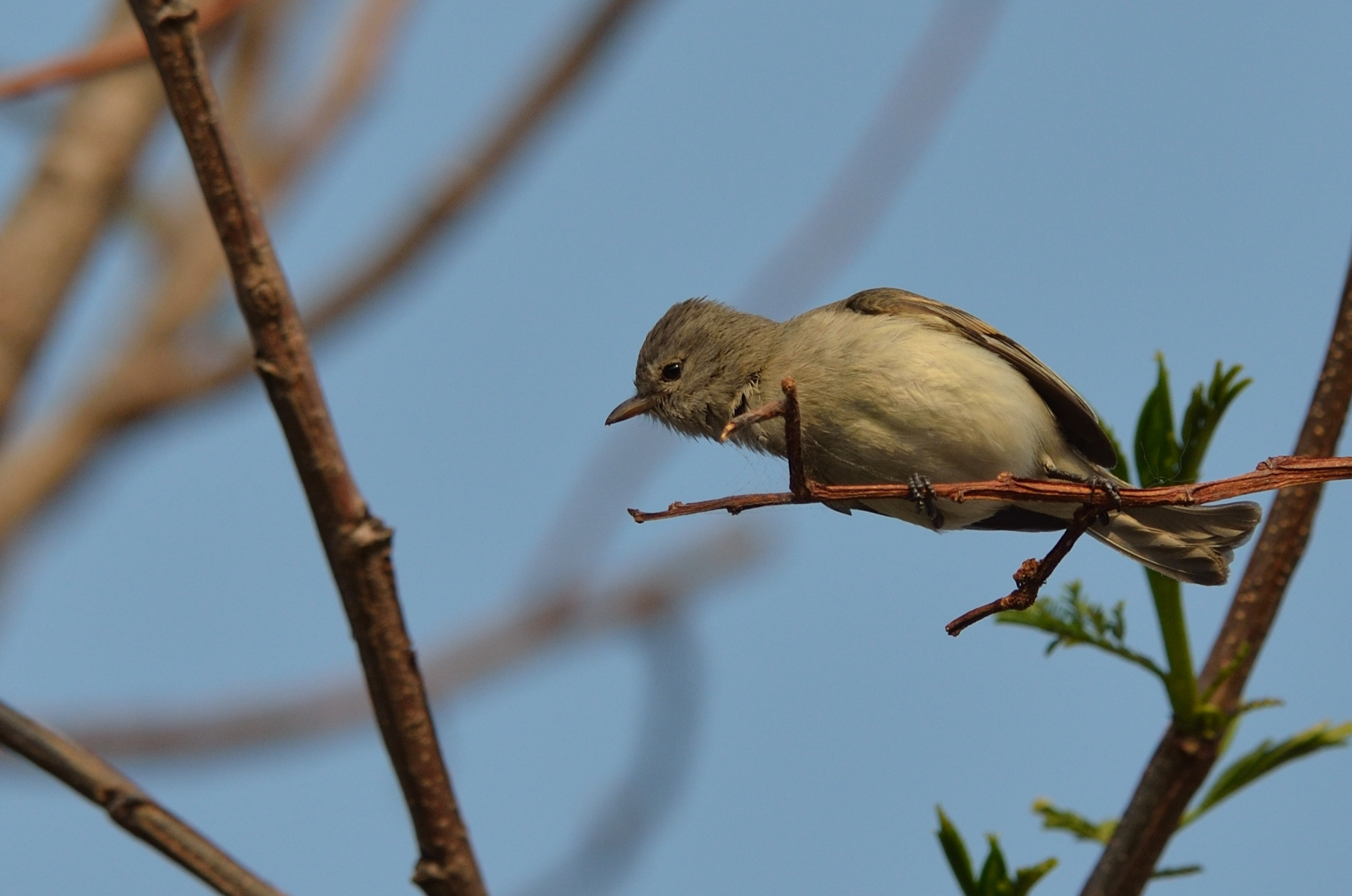 Tepoztlán, Morelos, México